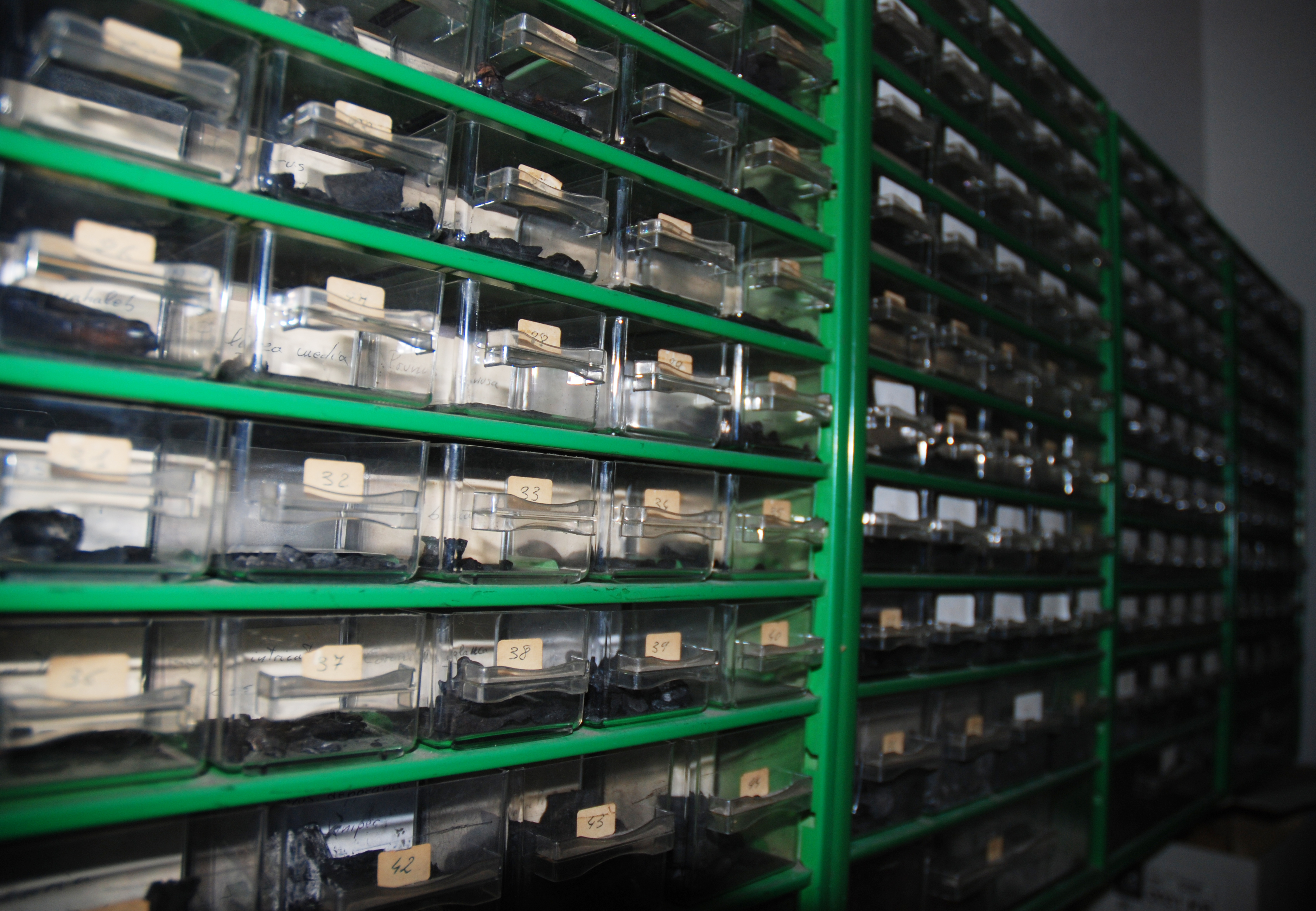 Colección referencia de carbones Departamento de Prehistoria, Arqueología y Historia Antigua de la Universidad de Valencia.